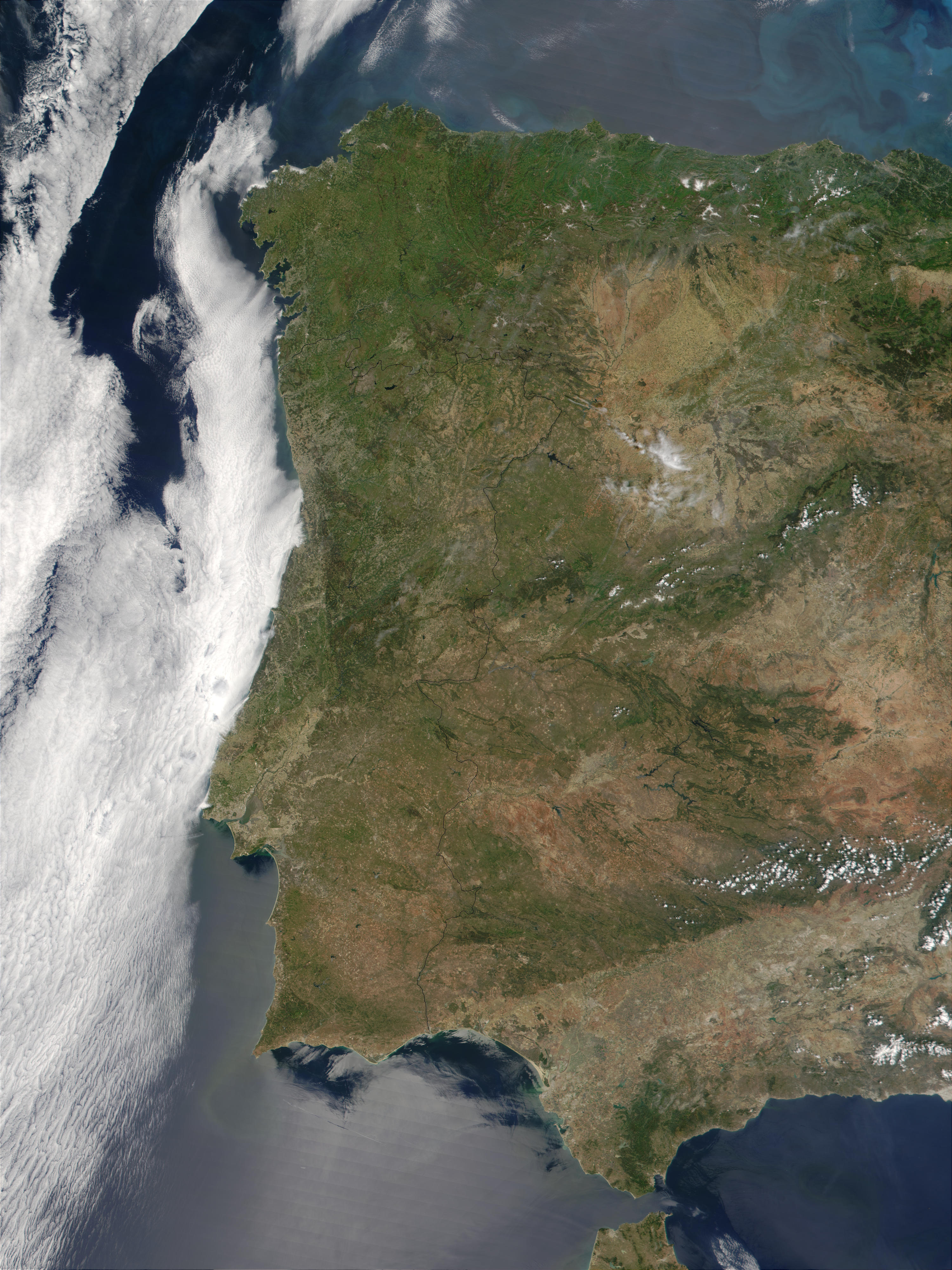 Portugal satelliet afbeelding van Terra / MODIS.